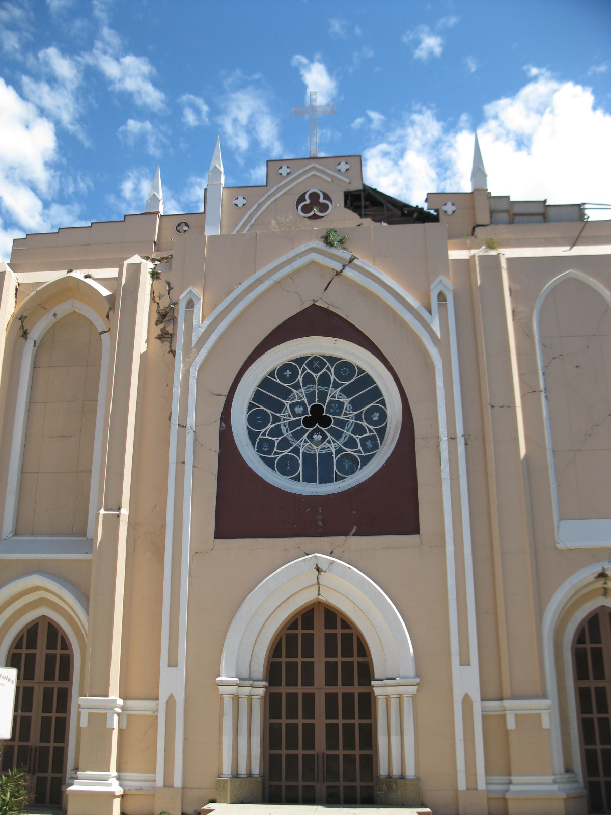 Frontis de la Iglesia de los Doce Apóstoles en Valparaíso. Se puede observar aún daños producidos por el terremoto del 2010. This is a photo of a national monument in Chile: 578